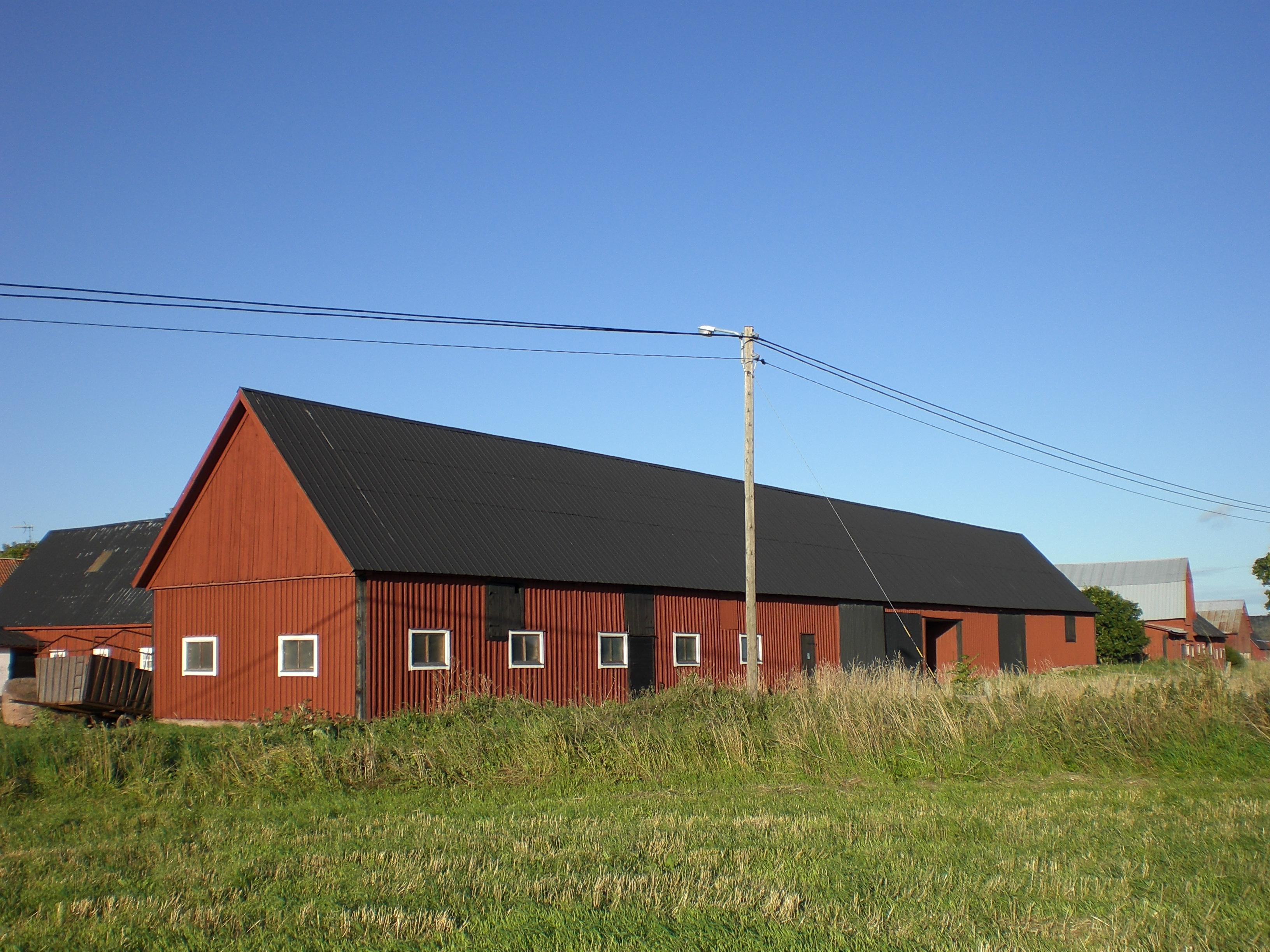 Hörninge, Dorf auf Öland, östlich von Köpingsvik, Blick von Süden